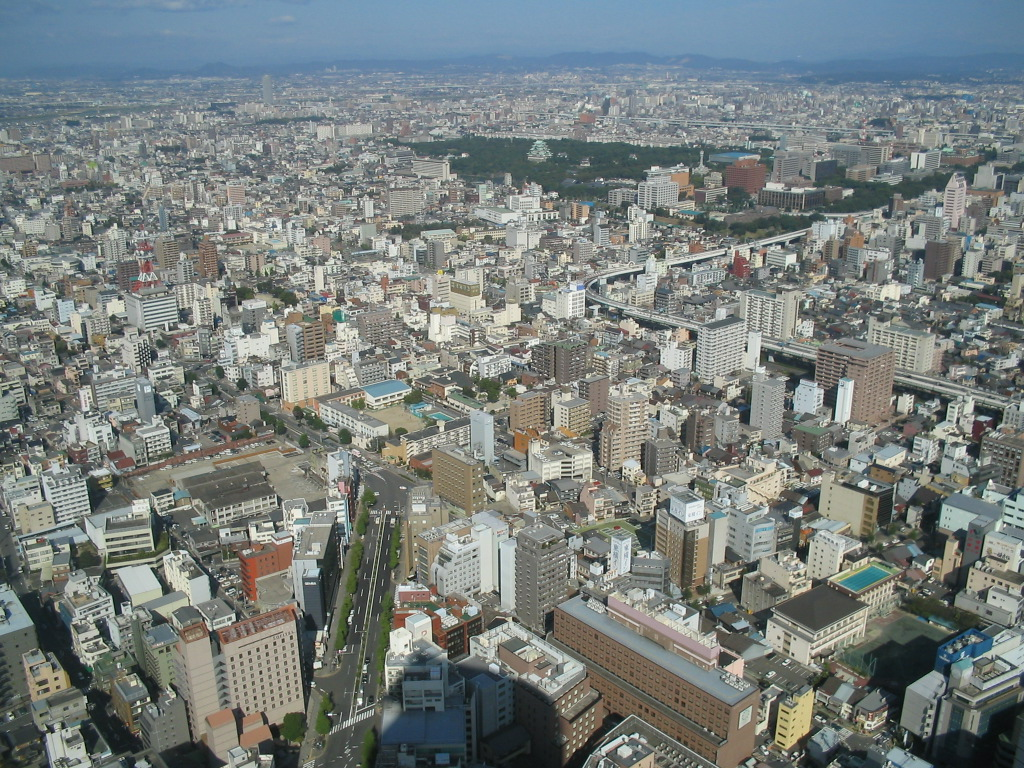 Nagoya view